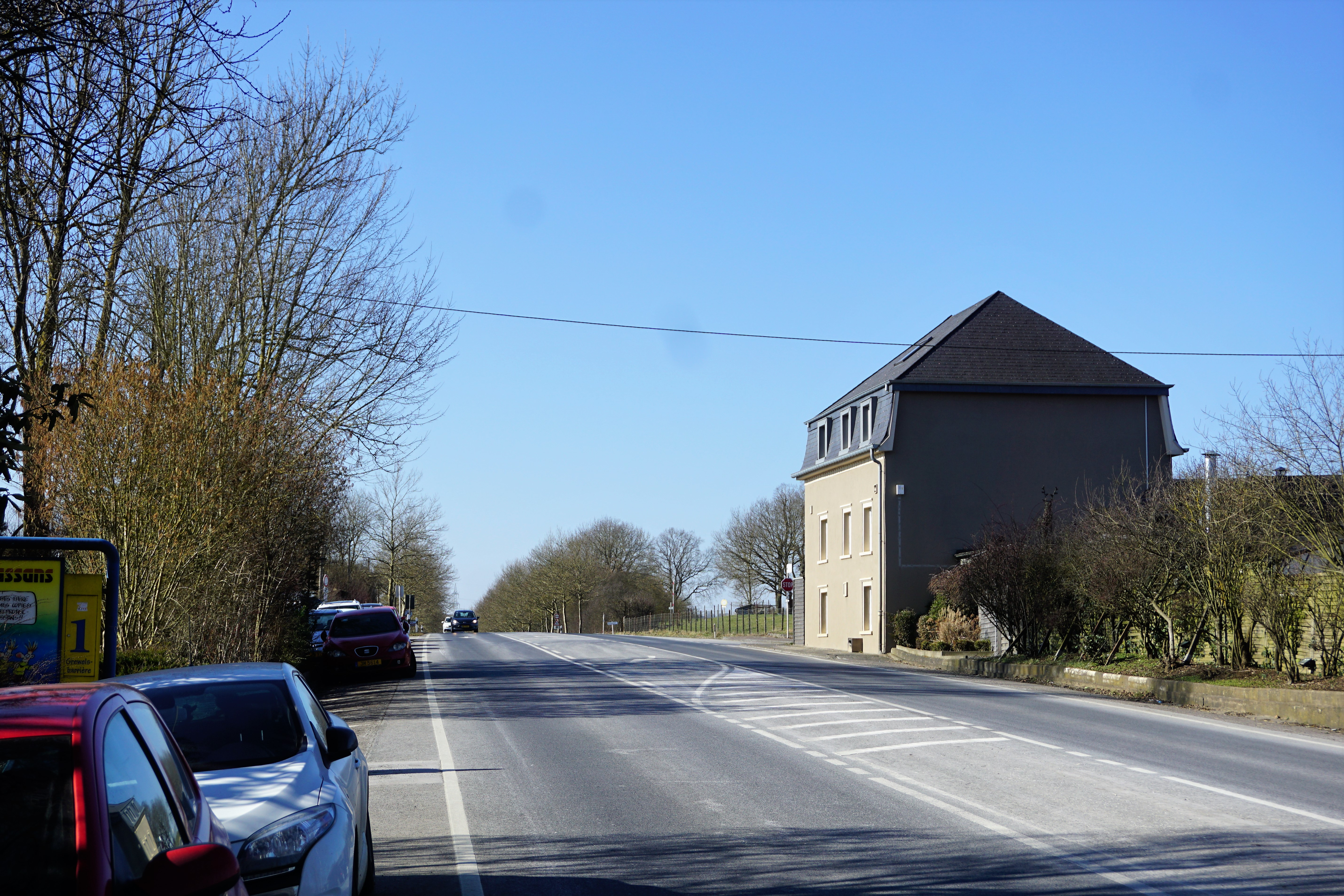 Bertrange, lieu-dit Gréiwels-Barrière.